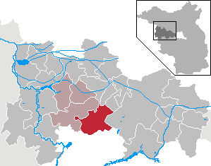 Märkisch Luch in Brandenburg (Country) - District Havelland